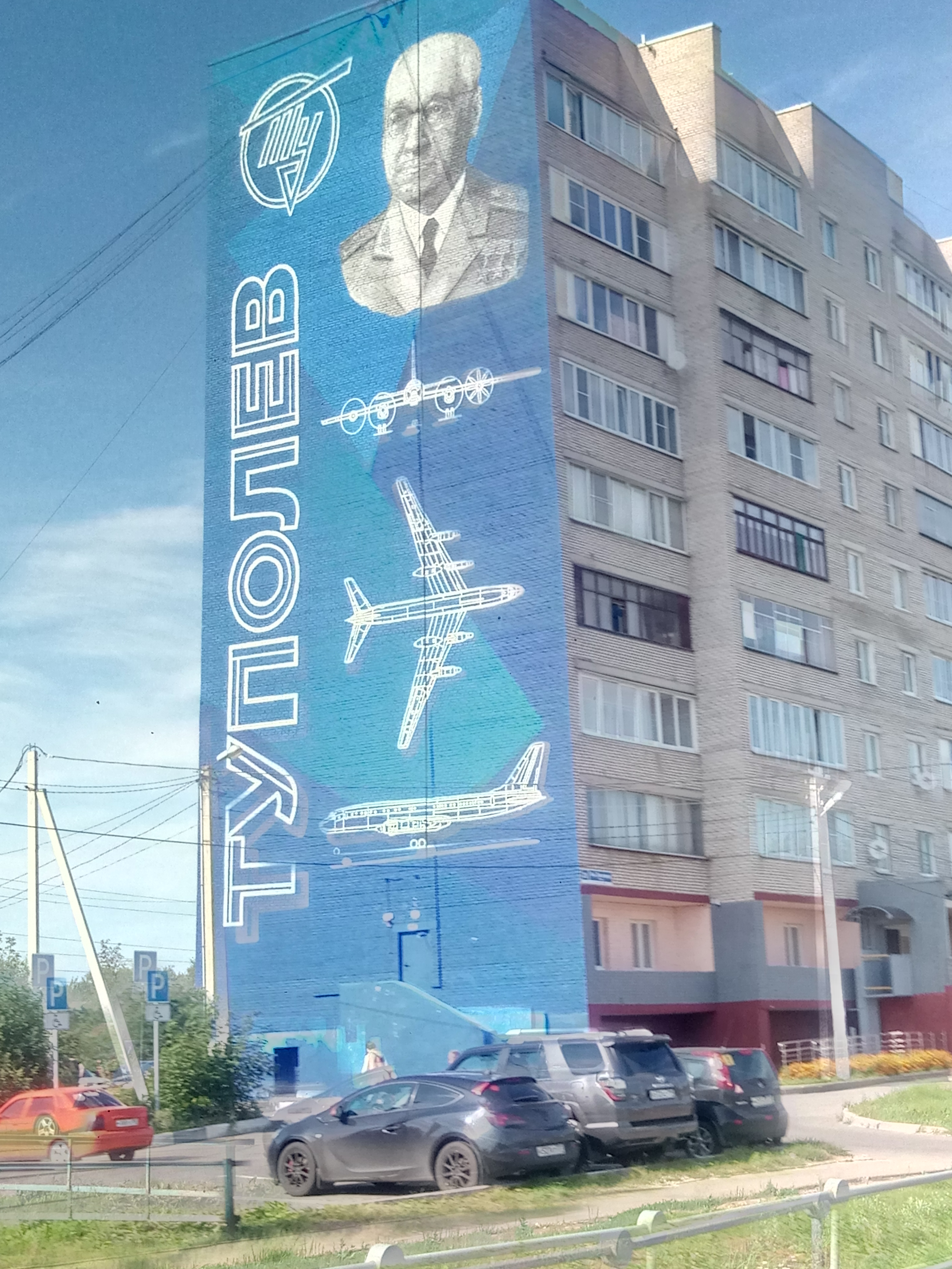 Панно на доме № 20 по проспекту Туполева